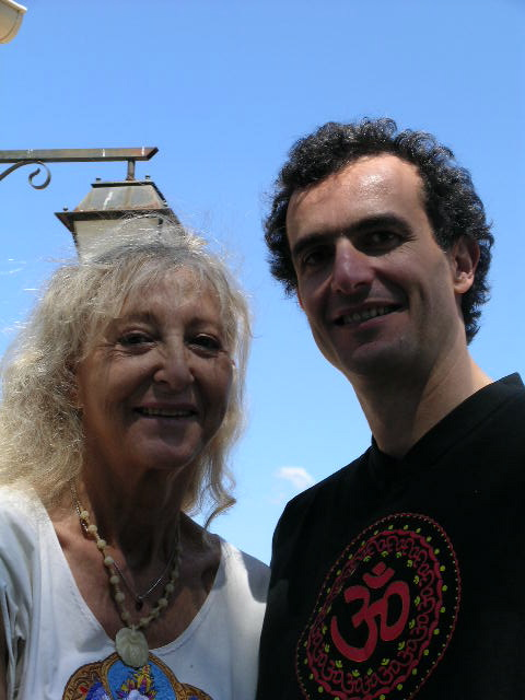 Margot ANAND et Philippe LEVY